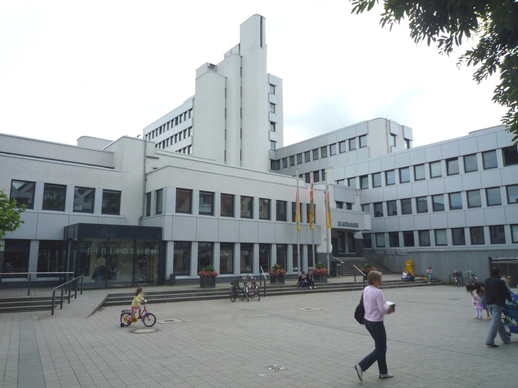 Rheda-Wiedenbrück: Rathausplatz mit renoviertem Rathaus und Stadtbibliothek